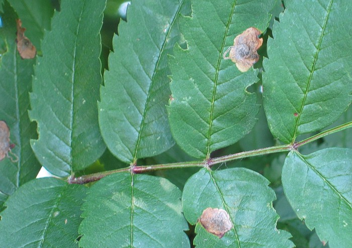 Mine von Stigmella sorbi